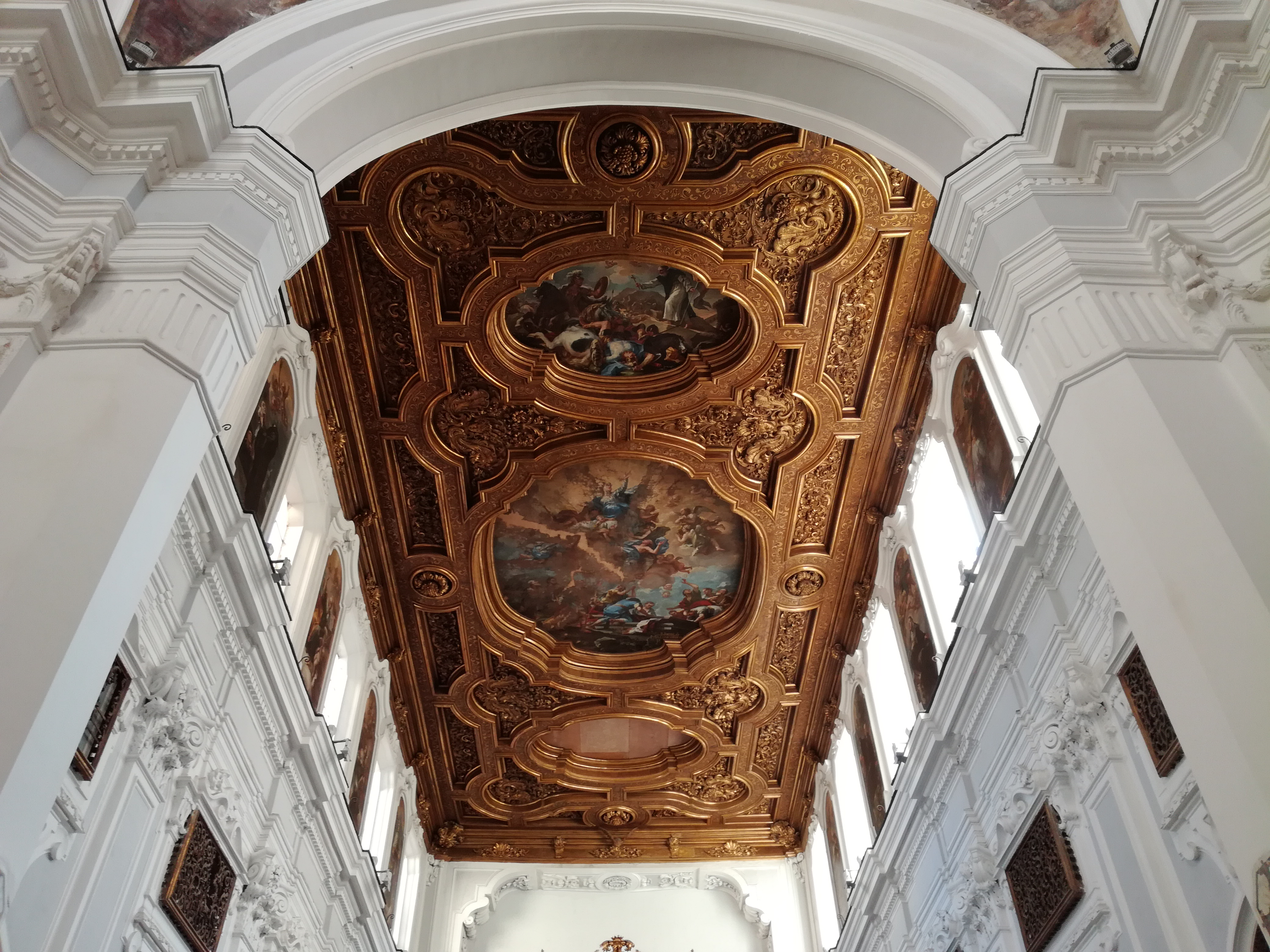 La volta della Chiesa S. Maria Donnalbina, Napoli